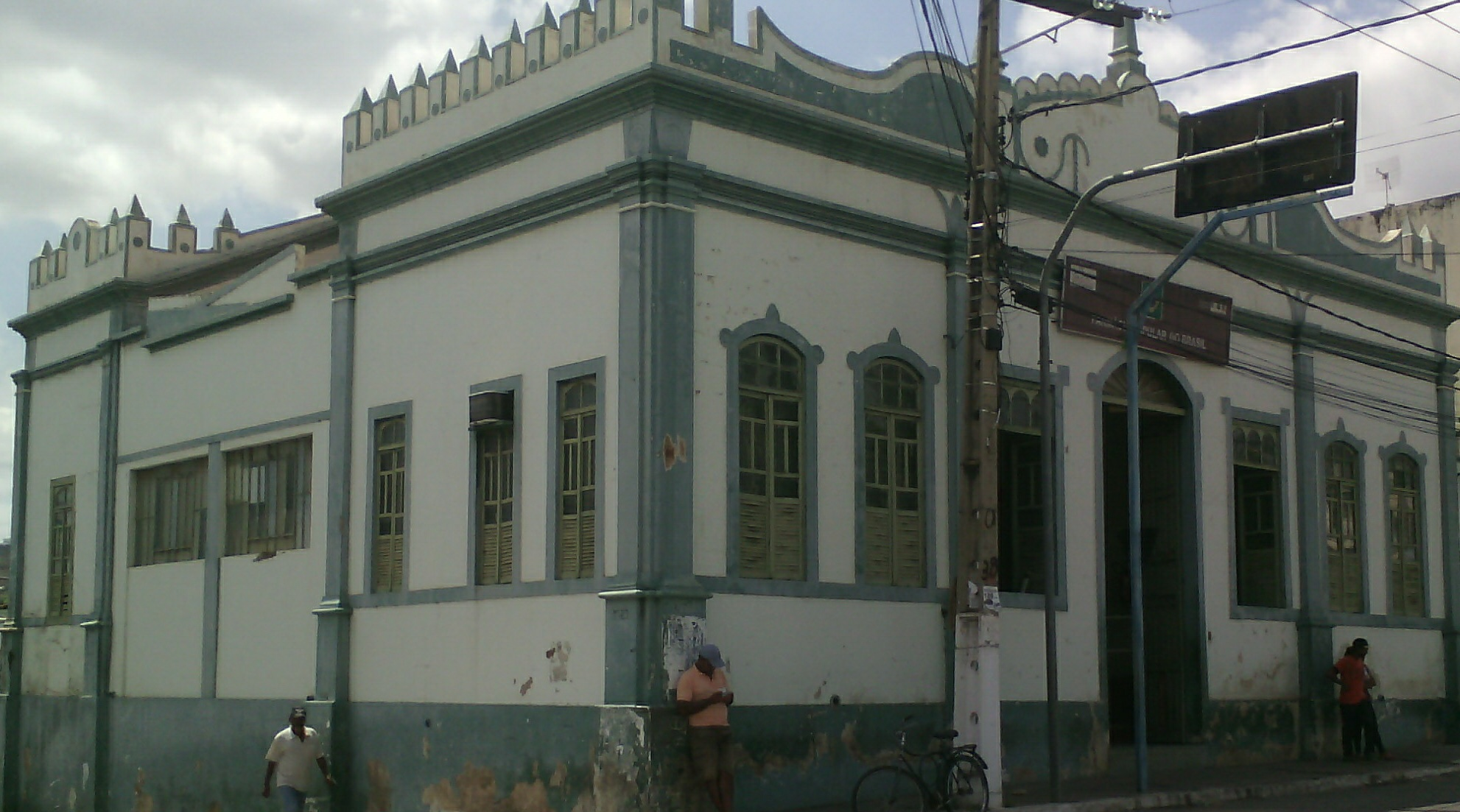 A antiga prefeitura de Brumado, fundada quando a cidade se chamava Bom Jesus dos Meiras.